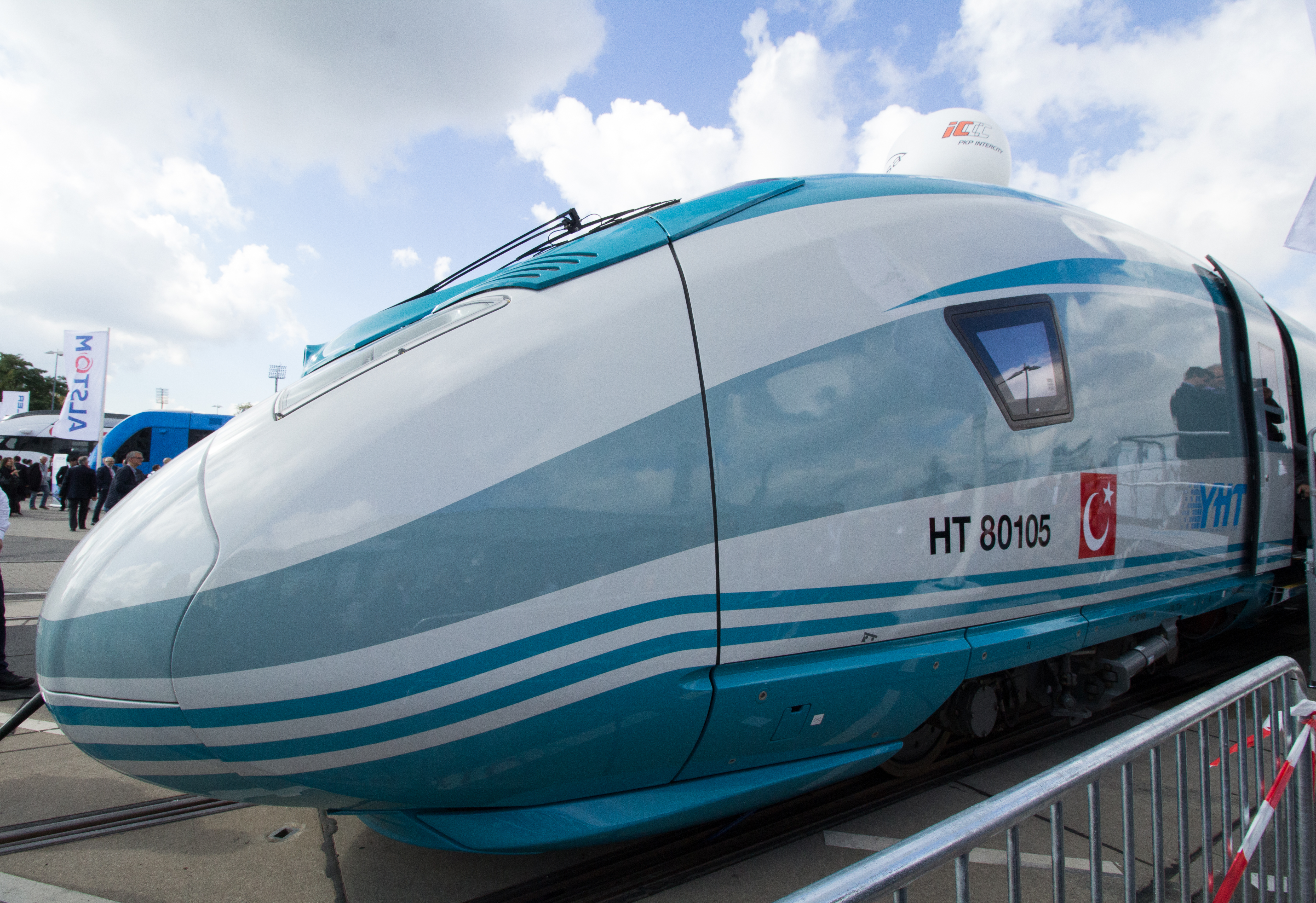 InnoTrans 2016 - TCDD HT 80000 - Siemens Velaro TR